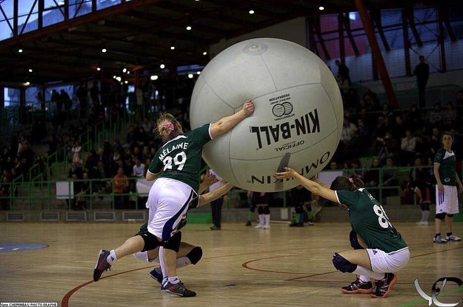 Mélaine Le Brazic lors de la 2ème journée du Championnat de France de Kin-Ball 2012-2013